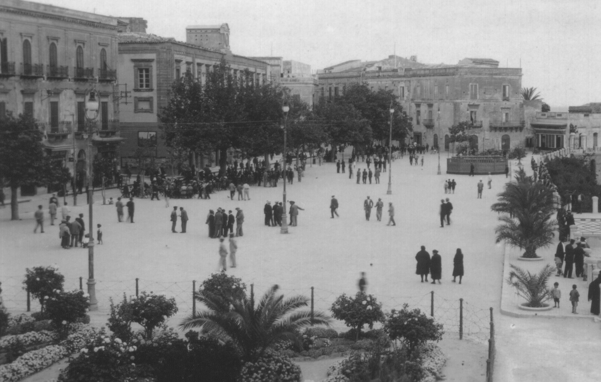 Piazza del Popolo a Sciacca.